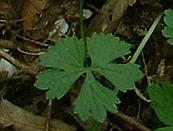 Renoncule tête d'or, Gy, Avril 2004